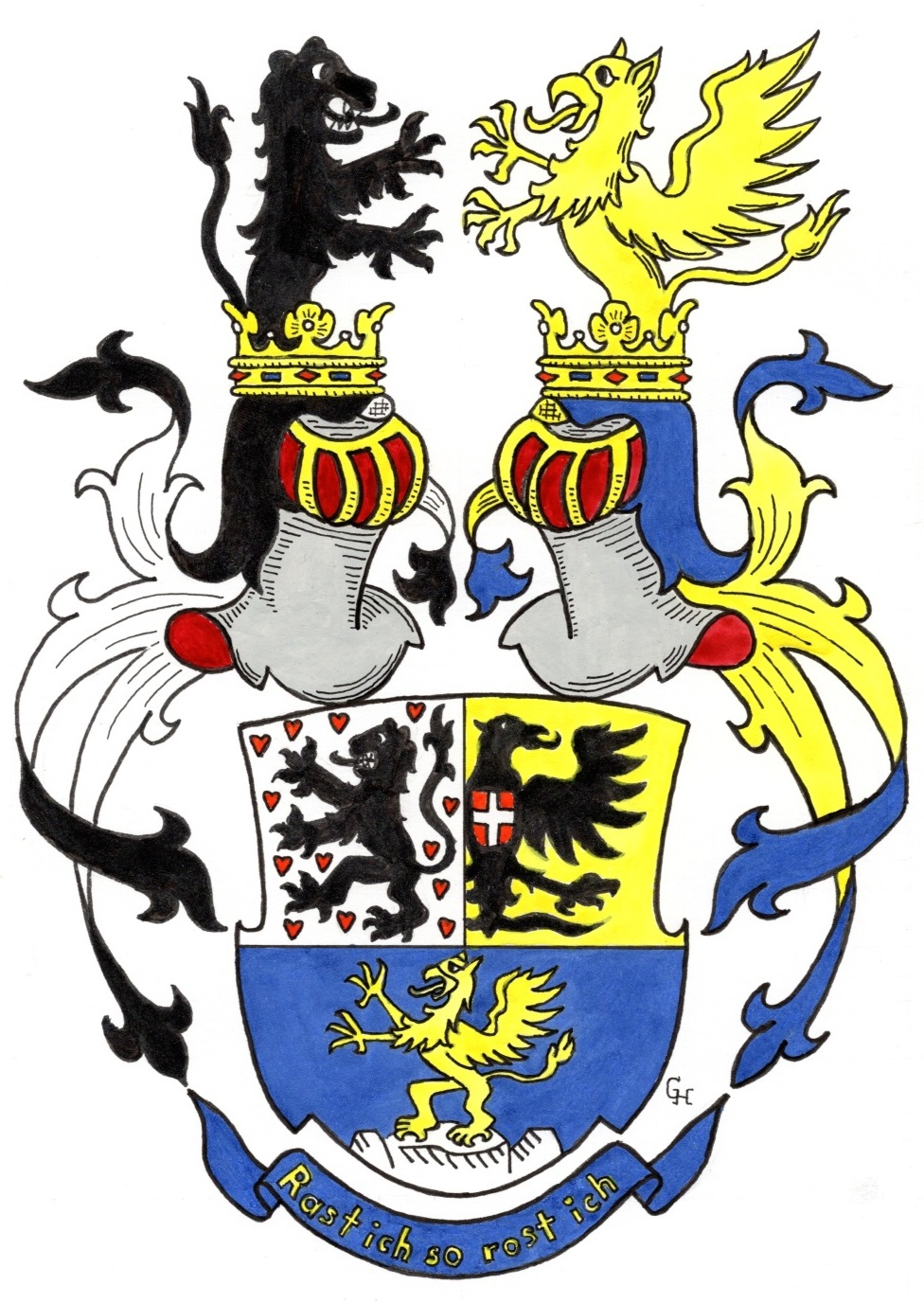 Wappen des deutsch-österreichischen Schauspielers Carl La Roche (1794–1884), verliehen anlässlich seiner Erhebung in den österreichischen Ritterstand 1873. Zeichnung von Gerd Hruška ( Für weitere Informationen zu dieser Standeserhebung siehe (